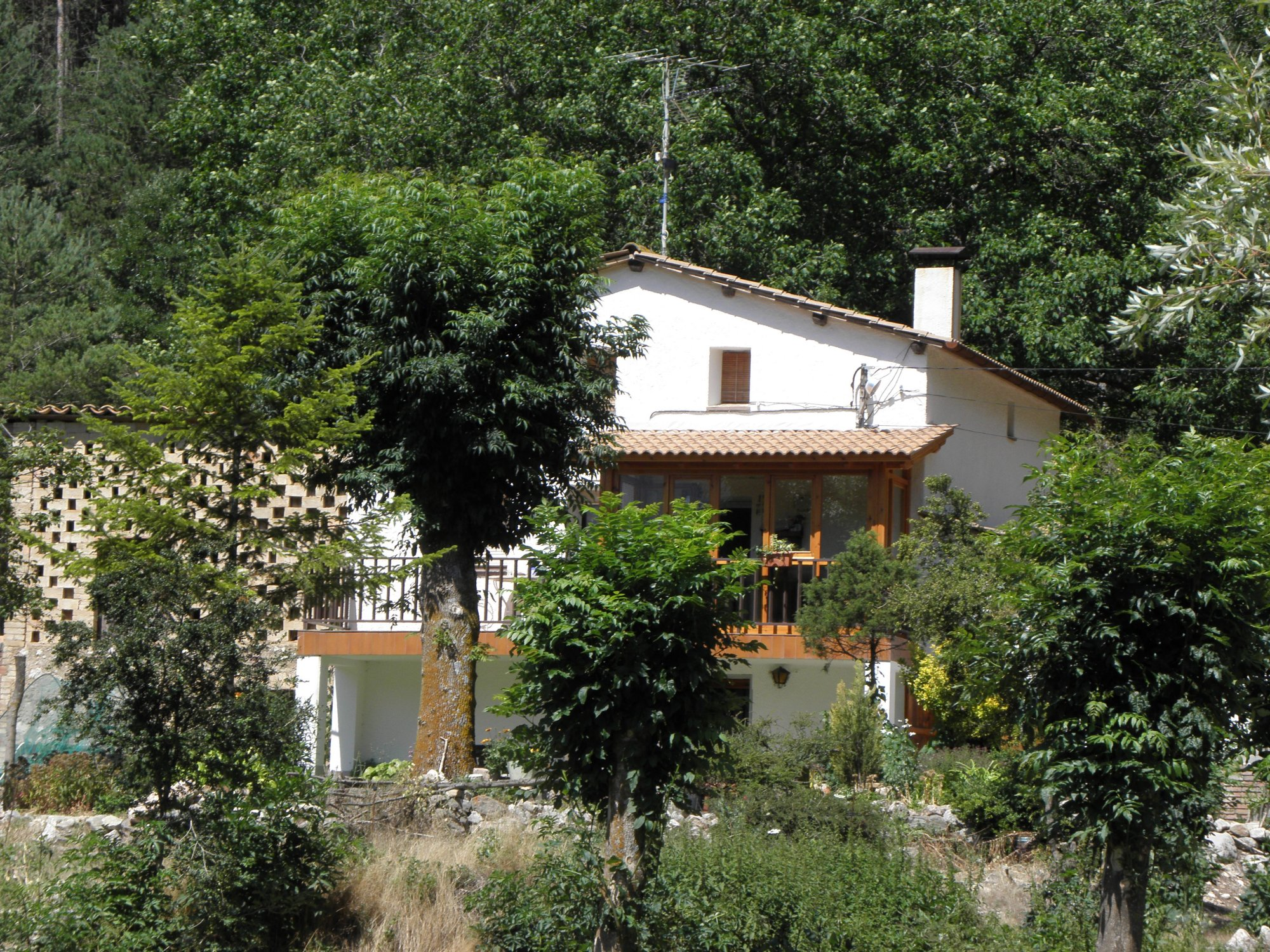 La masia de Cal Roset, al poble de la Coma (municipi de la Coma i la Pedra), a la Vall de Lord (Solsonès.